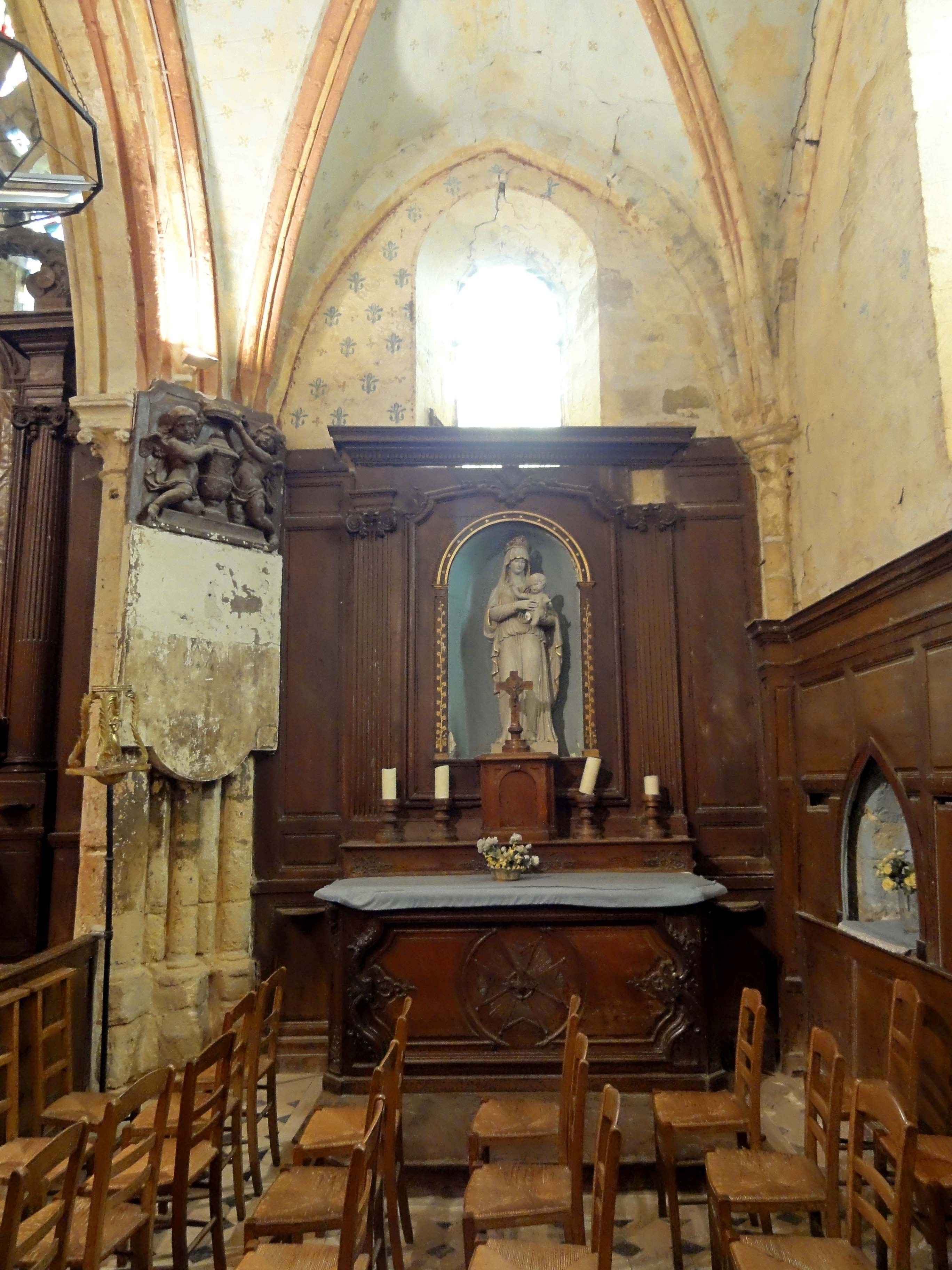 Intérieur de l'église (voir titre).